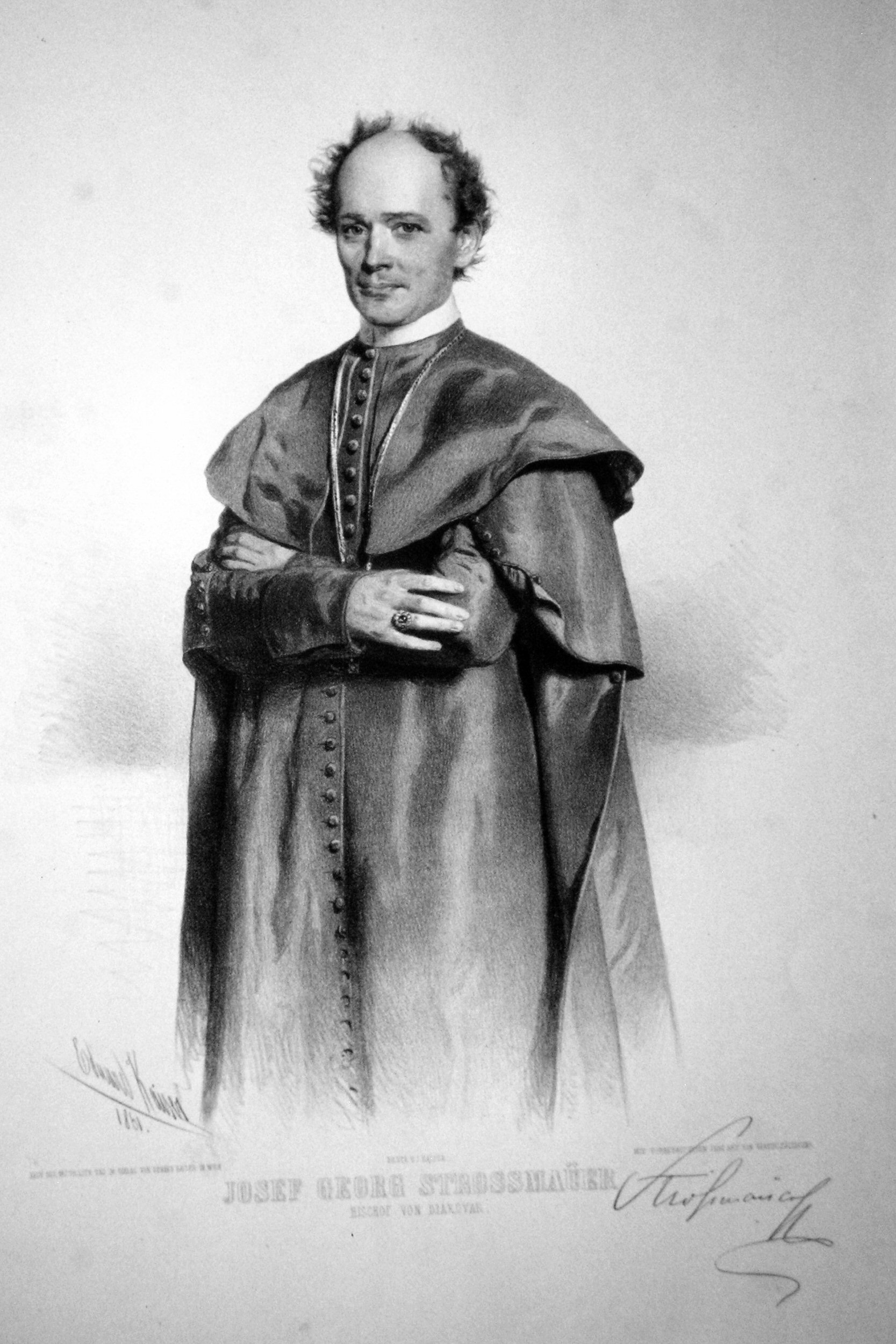 Johann Georg Srossmayer (1815-1905), kroatischer Bischof und Politiker Lithographie von Eduard Kaiser, 1861